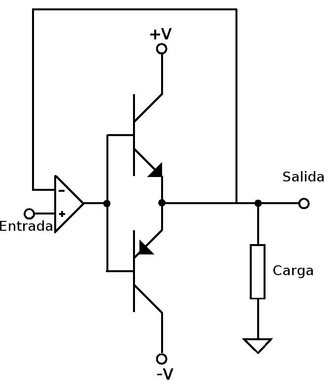 Amplificador de push-pull